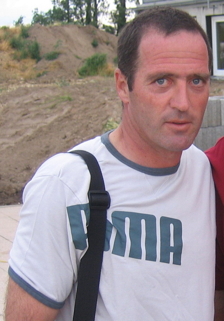 Uwe Bein bei einem Benefiz-Fußballspiel in Obersülzen